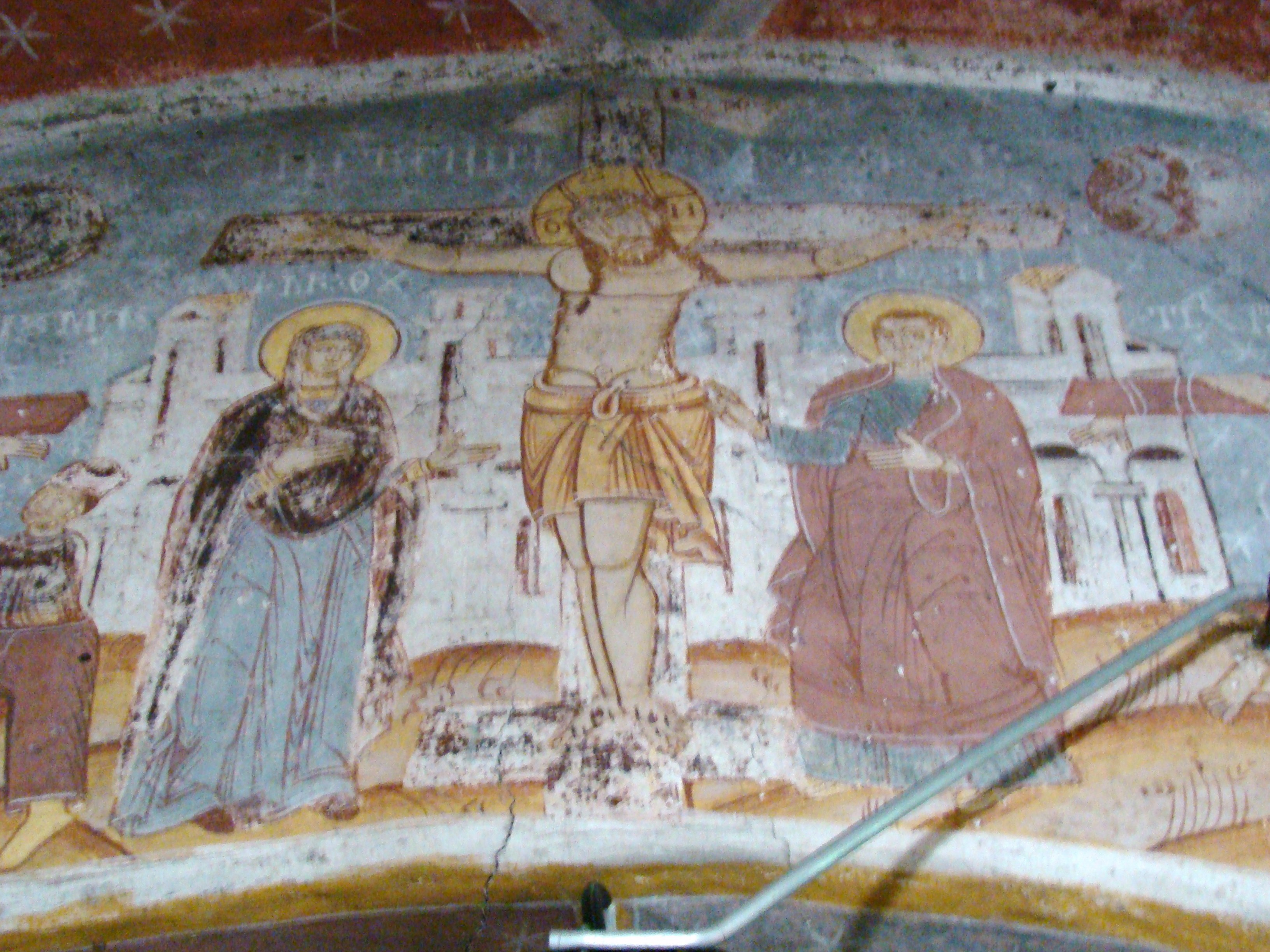 Biserica "Înălţarea Domnului" , sat NUCŞOARA; comuna SĂLAŞU DE SUS